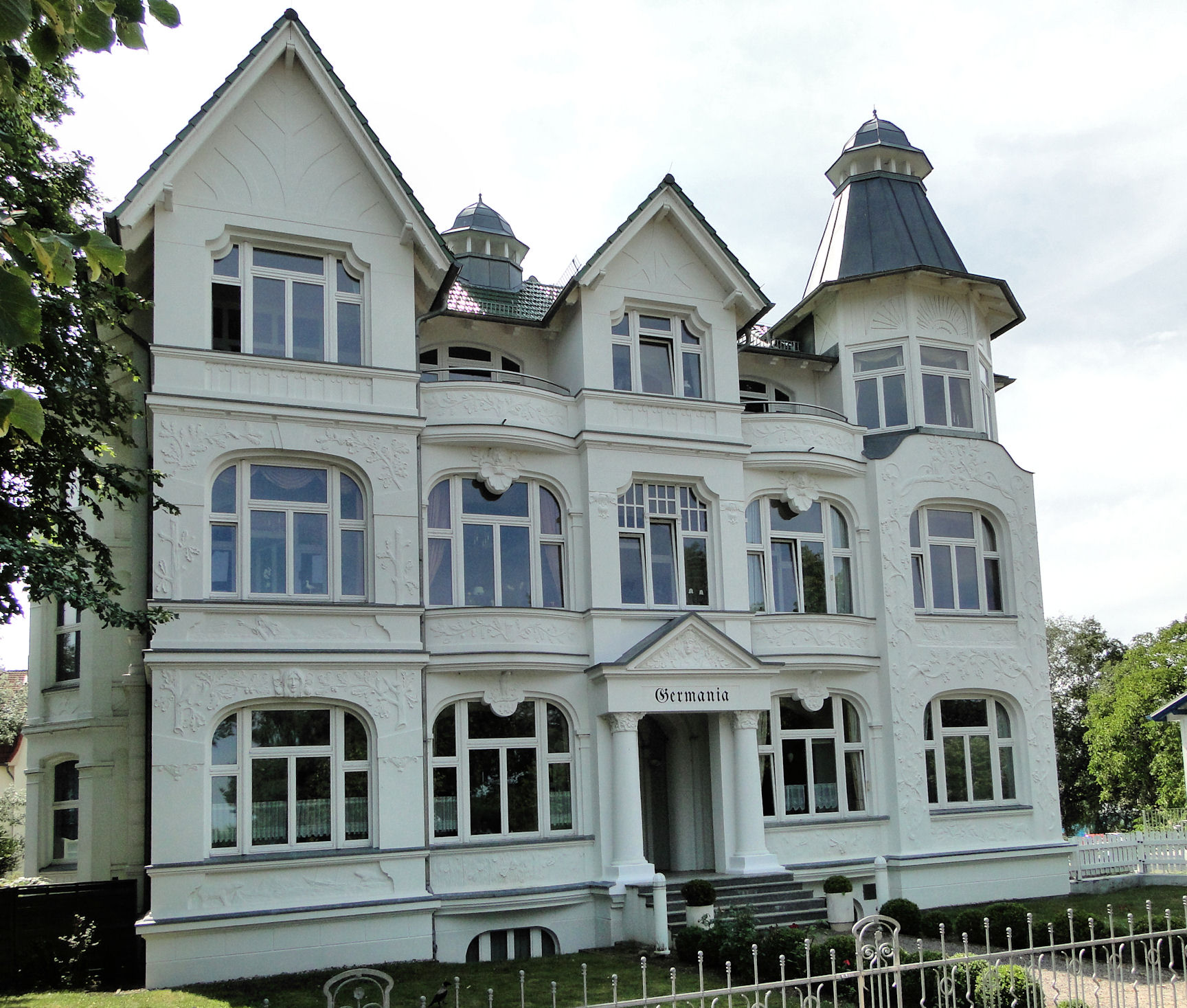 Pensjonat w Ahlbeck